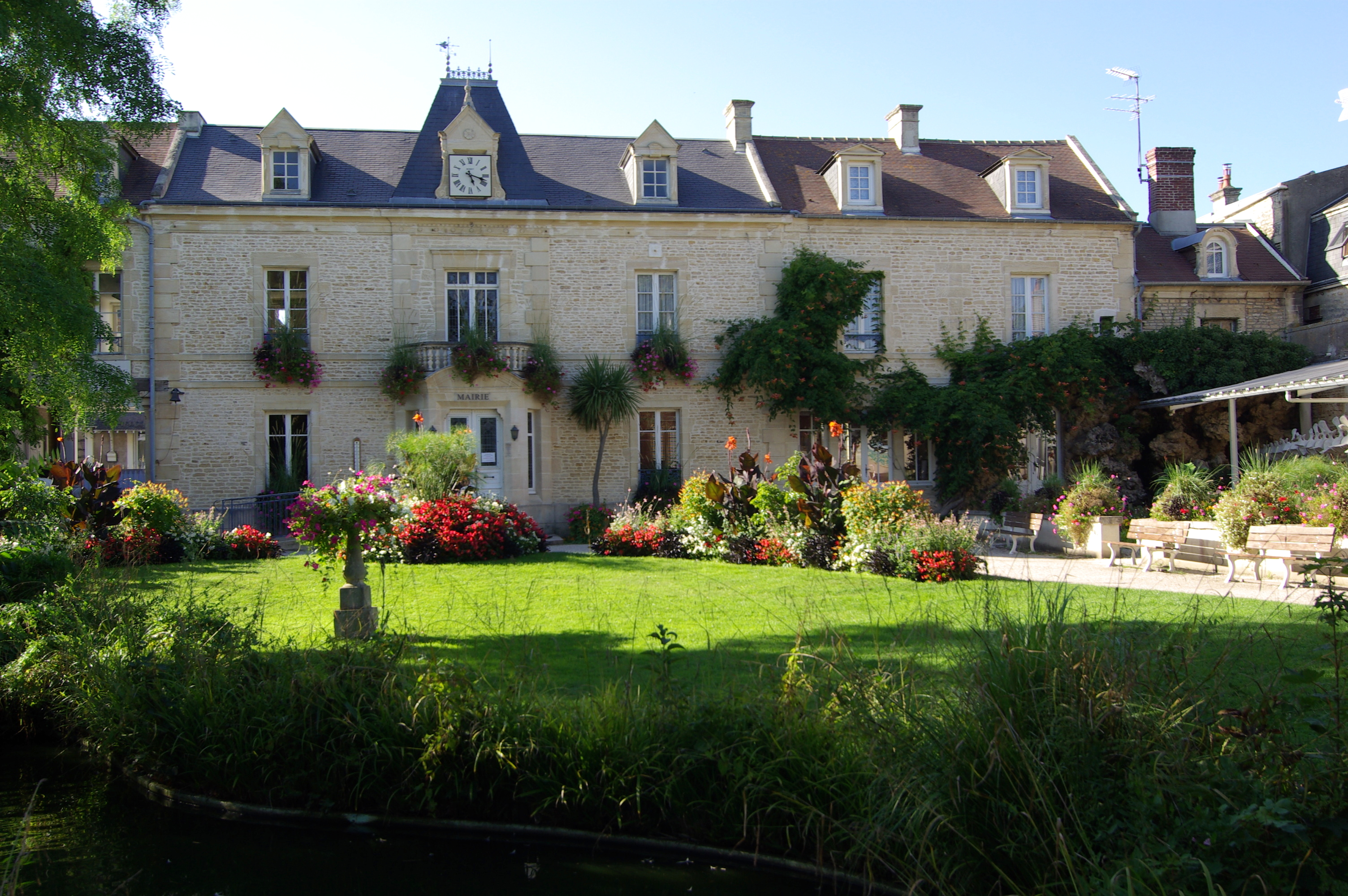 La mairie de Luc-sur-Mer côté jardin.